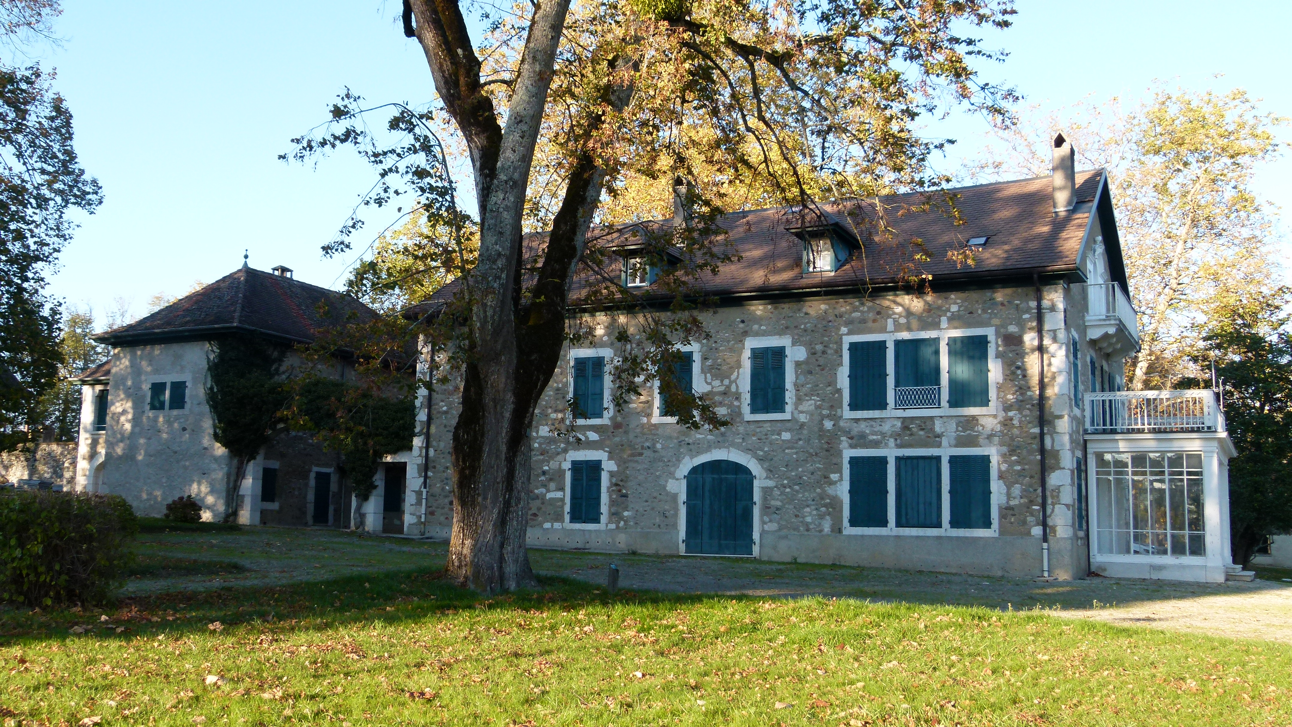 Schloss mit öffentlichem Park von Prévessin-Moëns